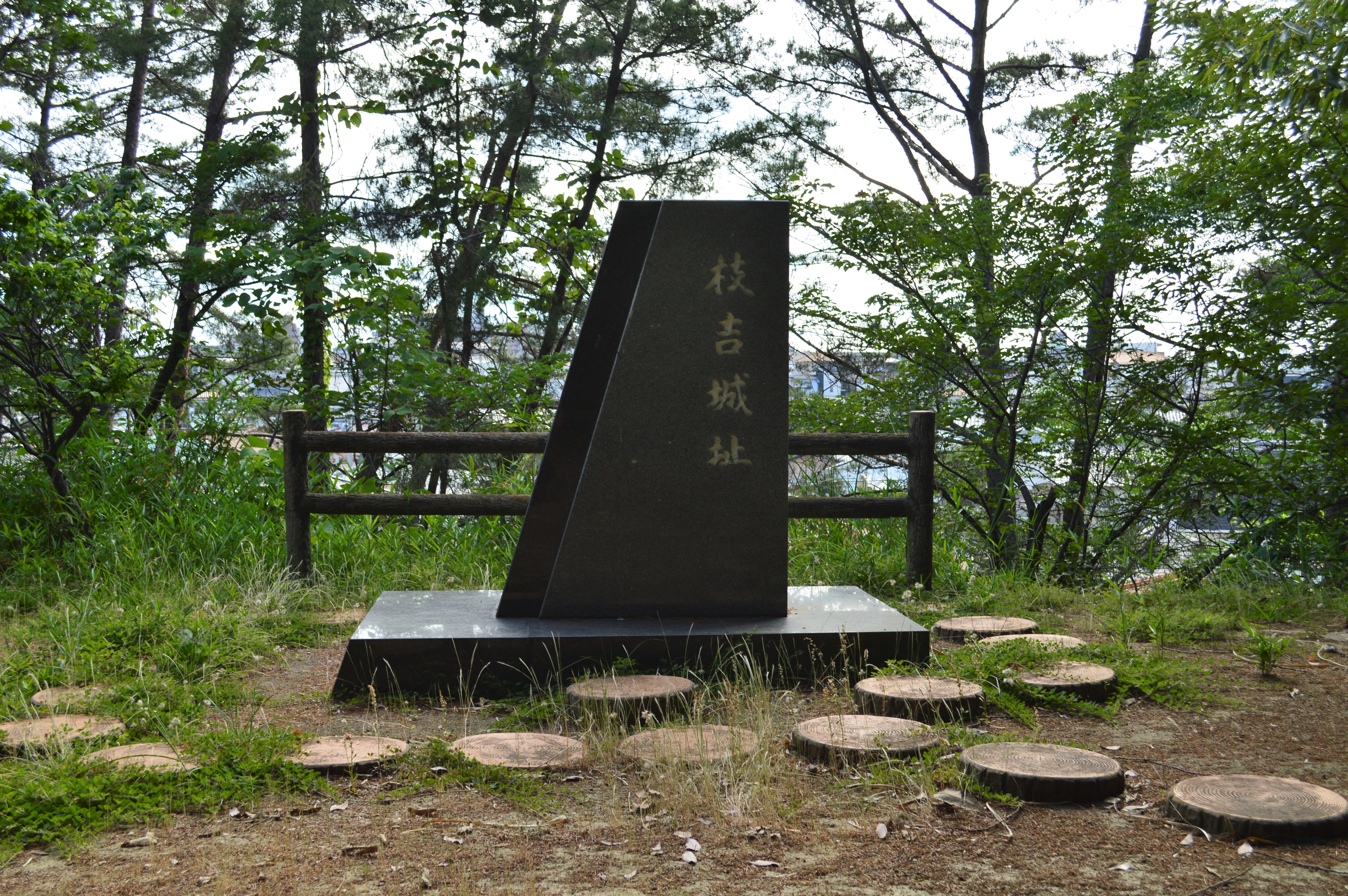 枝吉城址碑